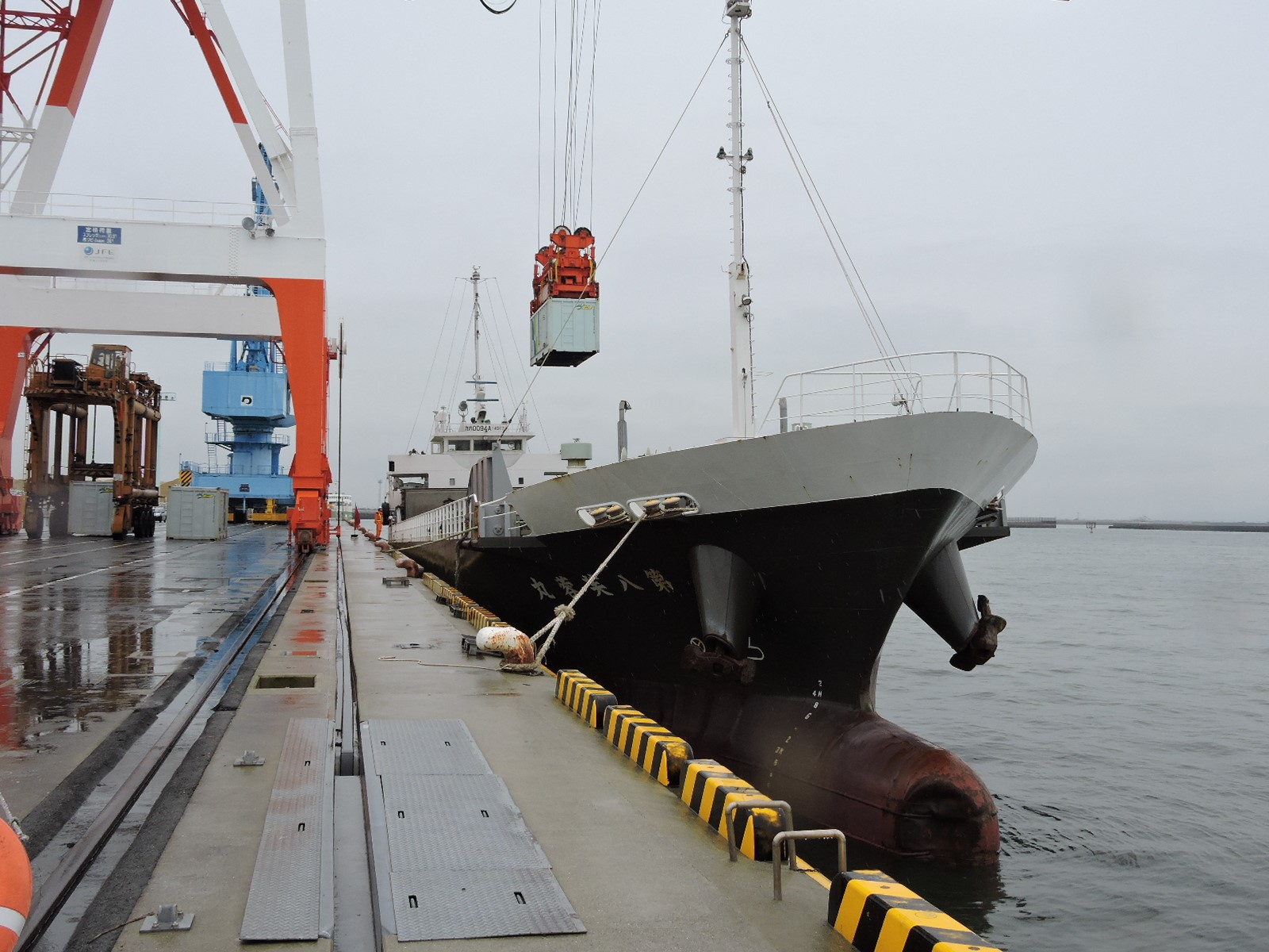 『 平成28年熊本地震 』 より発生した大量の災害廃棄物を、県外の廃棄物処理施設において広域処理するため、28年6月より熊本市内の仮置場においてコンテナに詰め込まれた災害廃棄物を、井本商運株式会社が熊本港から三重県の廃棄物処理施設に向けて、大阪港まで海上輸送する。 画像は、熊本港コンテナターミナルで、災害廃棄物コンテナの荷役風景。